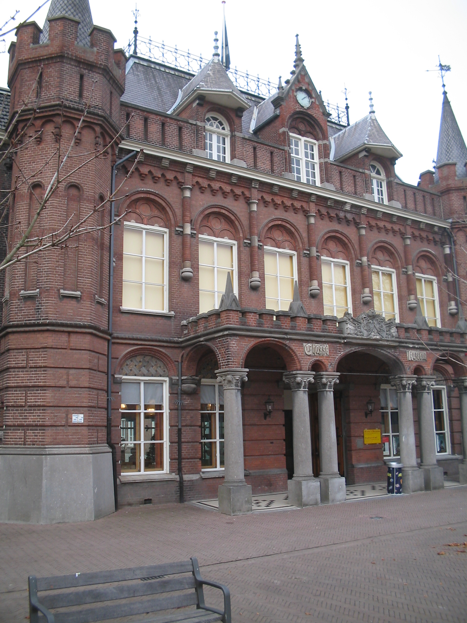 Zicht op een de ingang van de Chassékazerne in december 2005. Waarin nu nog is gevestigd het Stadsarchief Breda. Voorheen ook het Breda's Museum en latere Stedelijk Museum Breda